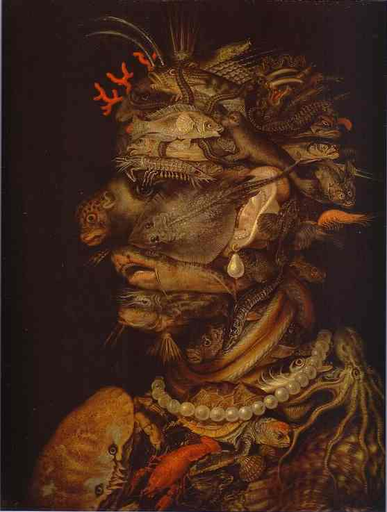 Elemento de la antigüedadlabel QS:Les,"Elemento de la antigüedad"